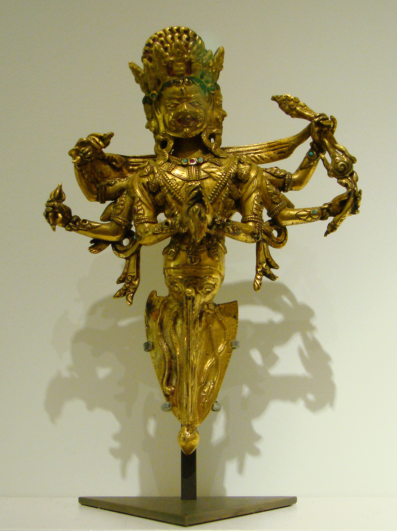 Vajrakila, personnification de la dague rituelle, Tibet, 16ème-17ème siècle, cuivre doré. Musée Guimet, Paris.